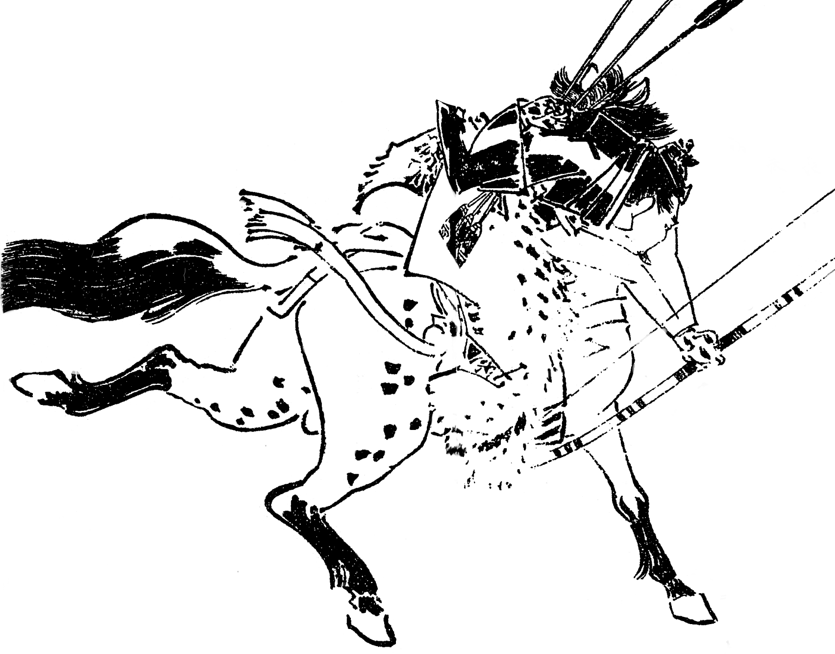 小笠原長清。平安時代末期 - 鎌倉時代前期の武将。／江戸時代『前賢故実』より。画：菊池容斎